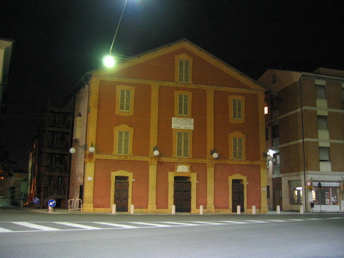 Teatro Rossini (Rossini Theatre) in Lugo